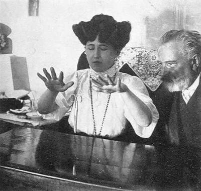 Stanisława Tomczyk and the parapsychologist Julian Ochorowicz in 1909.